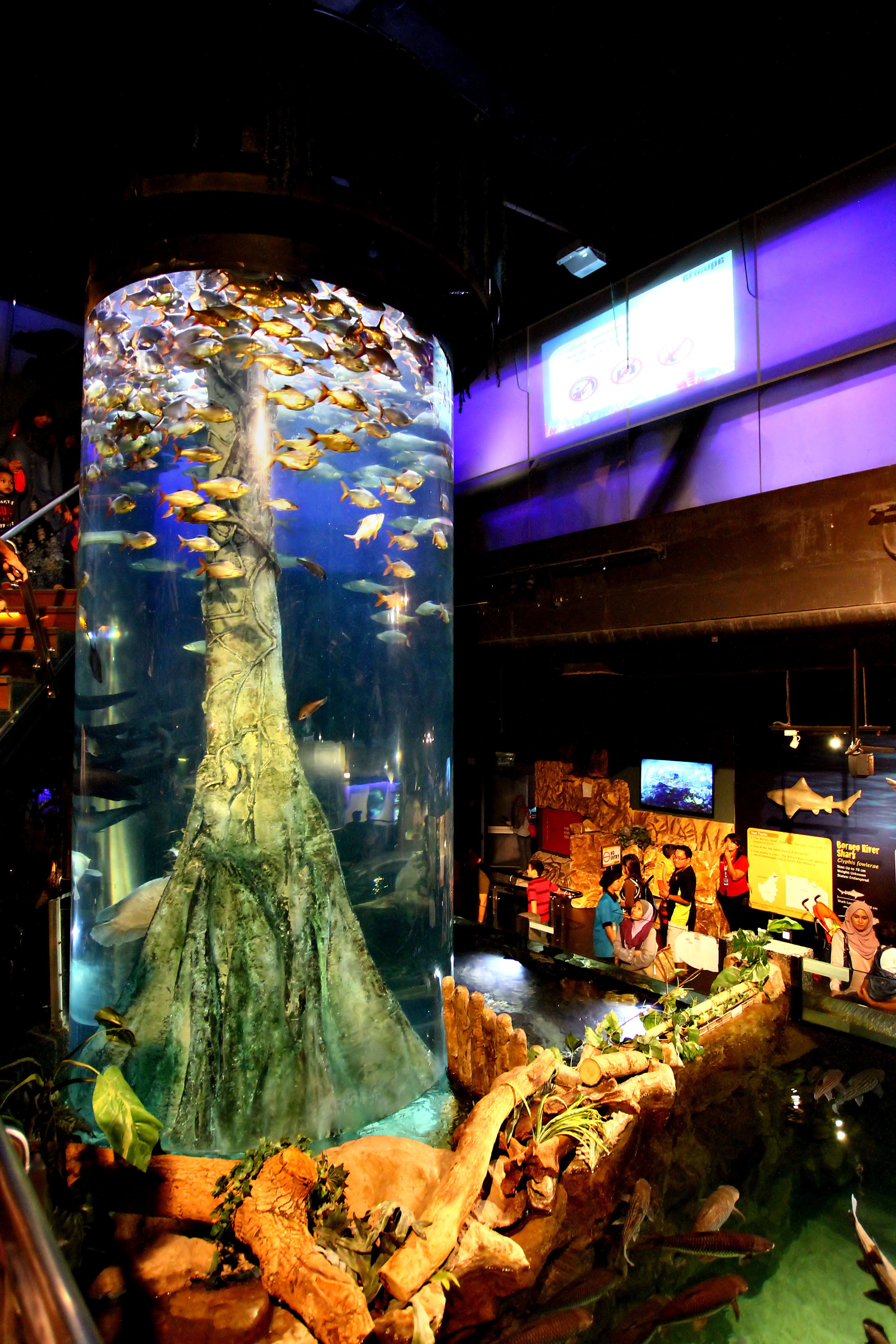 inside Aquaria KLCC